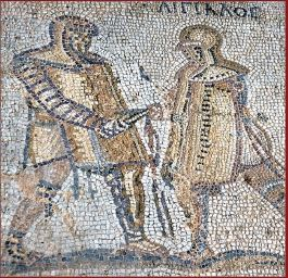 Mosaik Provo Kos 3Jh